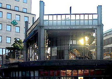 Café Muttern vid Sergels torg, rivning augusti 2004